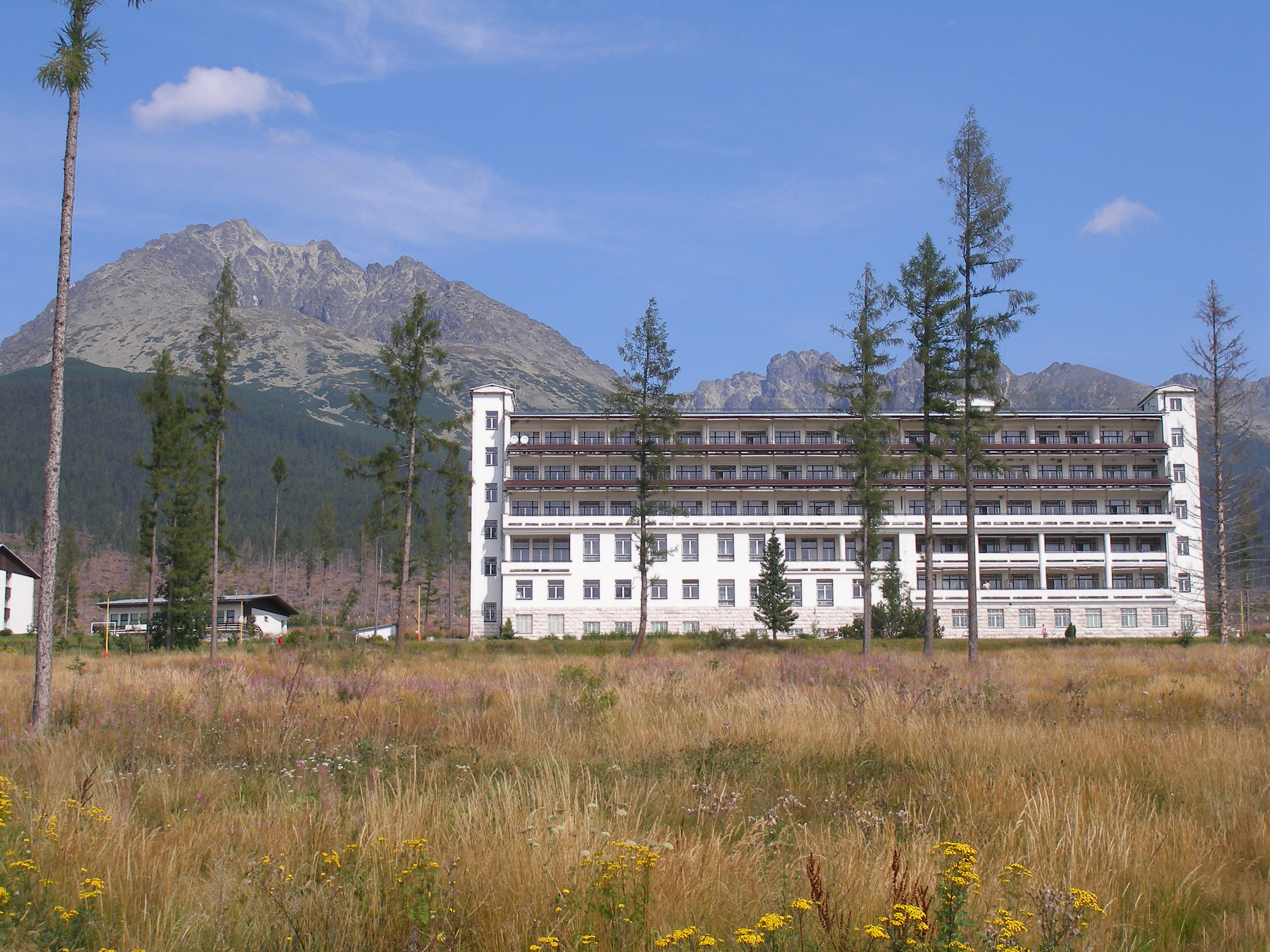 Tatranská osada Nová Polianka vojenský liečebný ústav